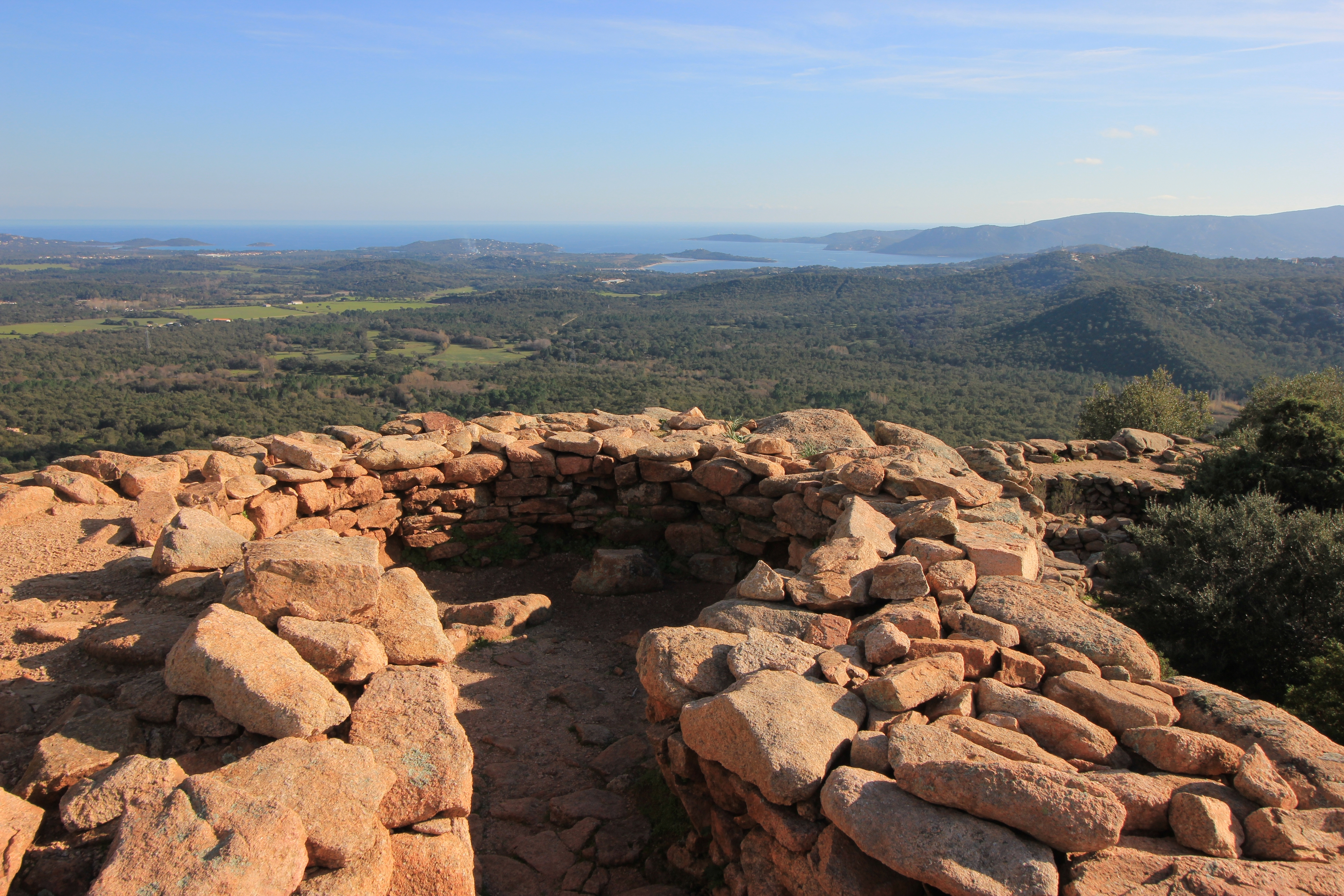 Prähistorische Ruinen des Casteddu d'Araghju bei Porto-Vecchio, Korsika